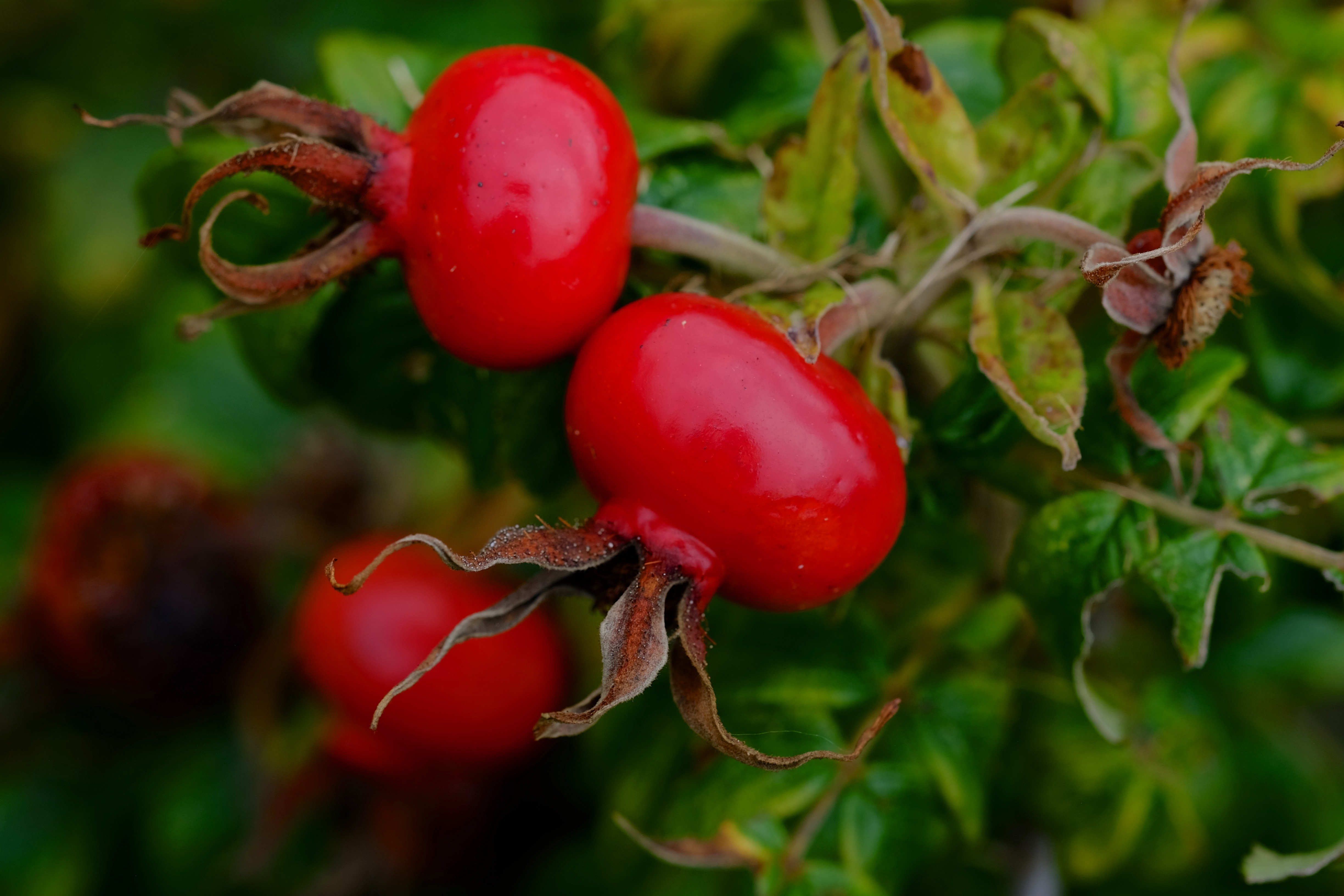 Faux-fruits du rosier (Cynorhodon), Landes, France